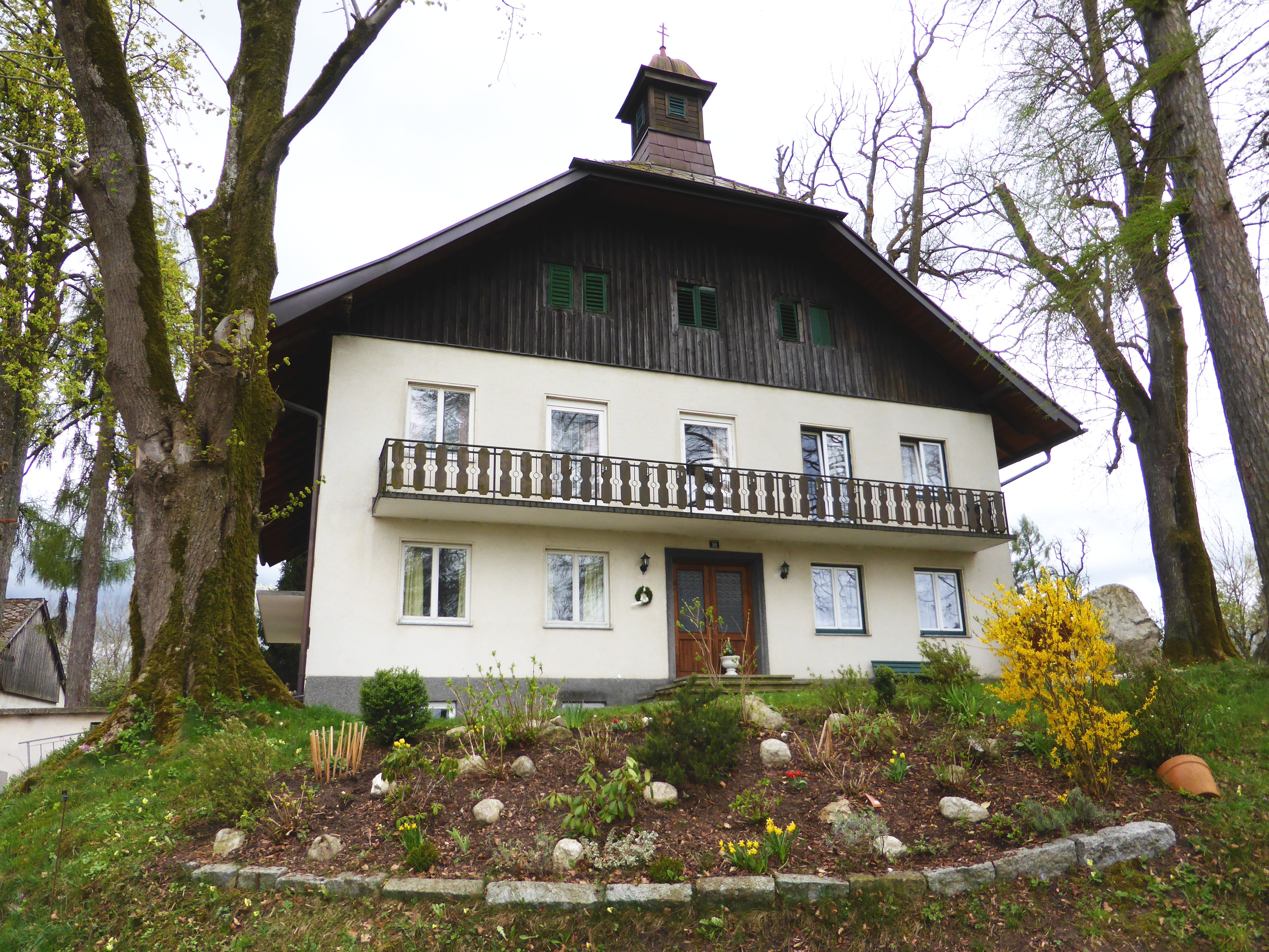 Gut Seeling (St. Georgen am Attersee)